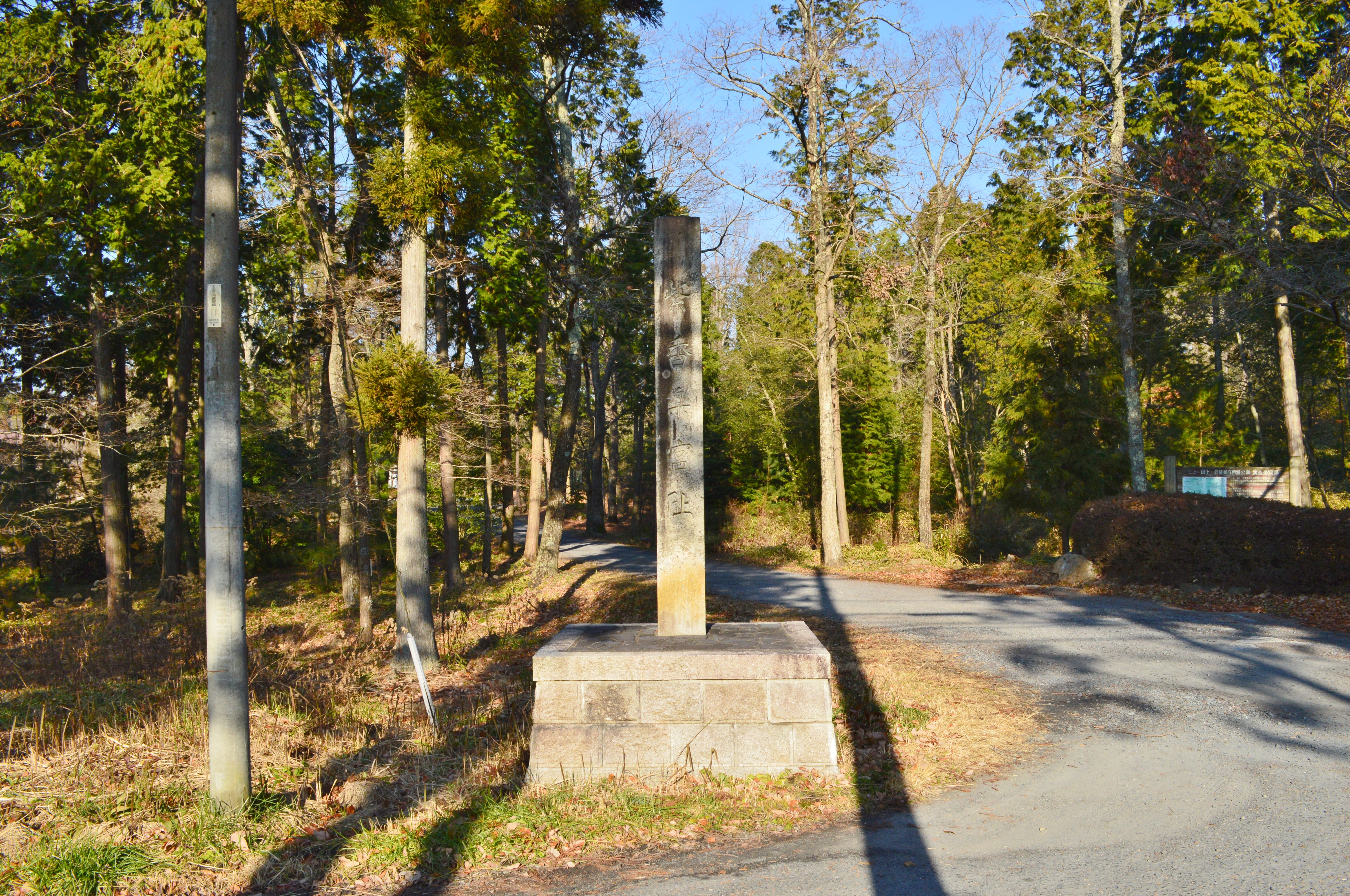 紫香楽宮跡内裏野地区 石碑